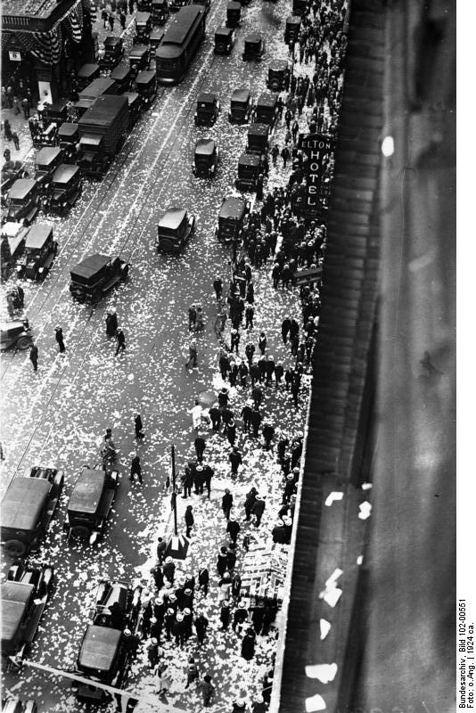 Wahlpropaganda zu den Präsidentenwahlen in Amerika ! Millionen von Flugblättern in den Strassen New Yorks.